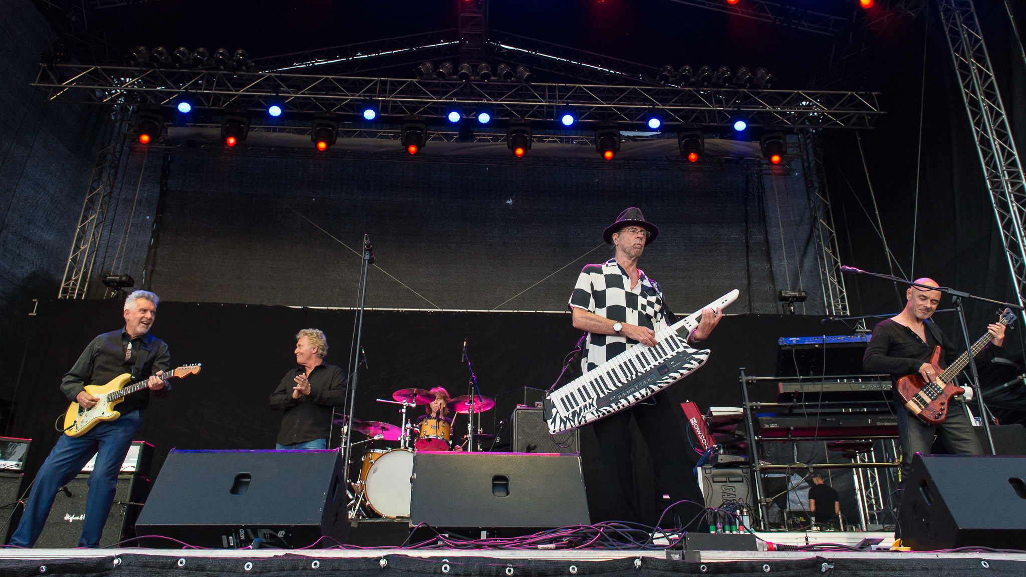 Brombachsee,Concertbüro Franken,Festival,Jimmy Copley,Konzert,Lieder am See,Livekonzert,Livemusik,Manfred Mann,Manfred Mann’s Earth Band,Mick Rogers,Musik,Robert Hart,Steve Kinch